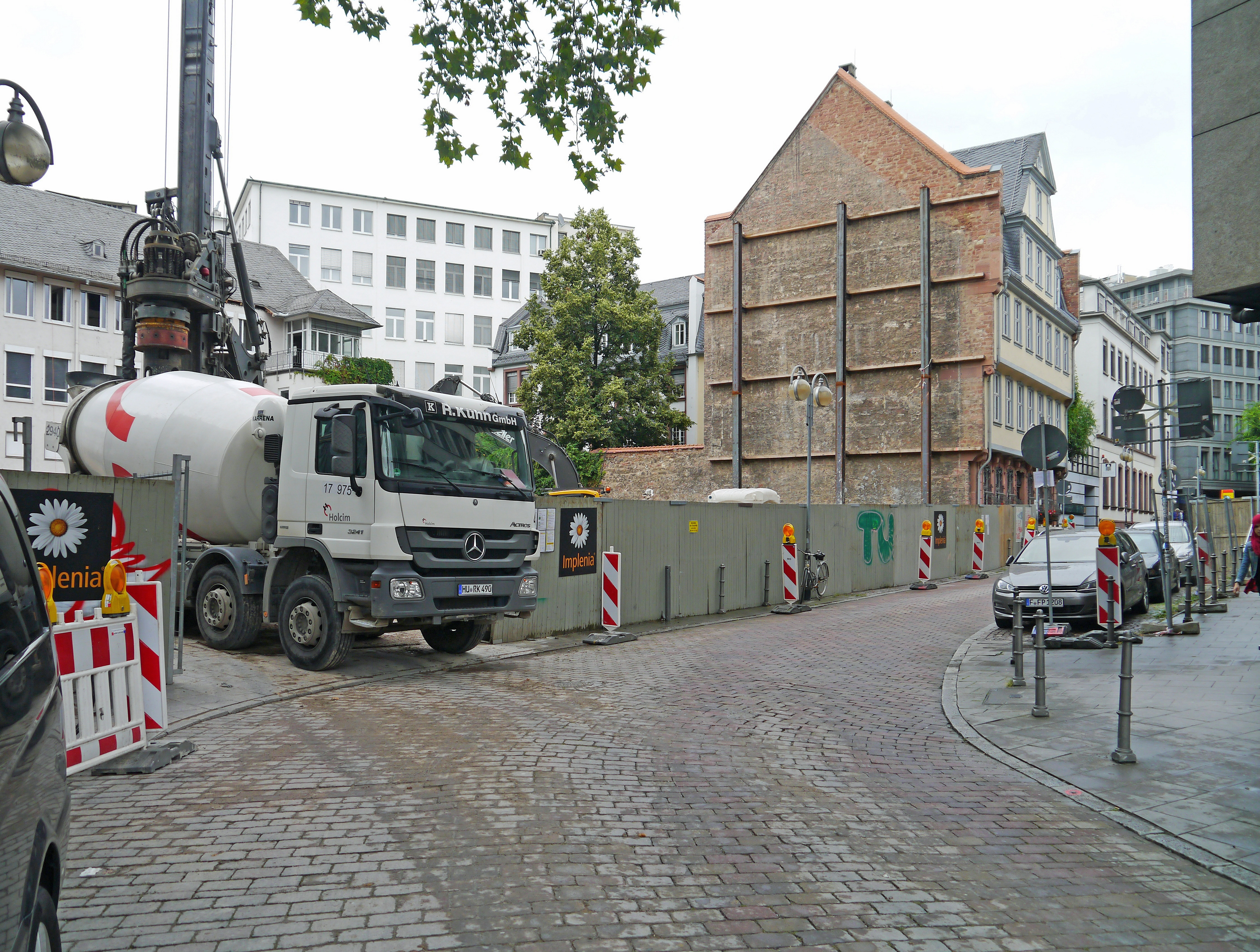 Goethehöfe- und Romantik-Museum-Baustelle, 2016 im Großen Hirschgraben in Frankfurt am Main.